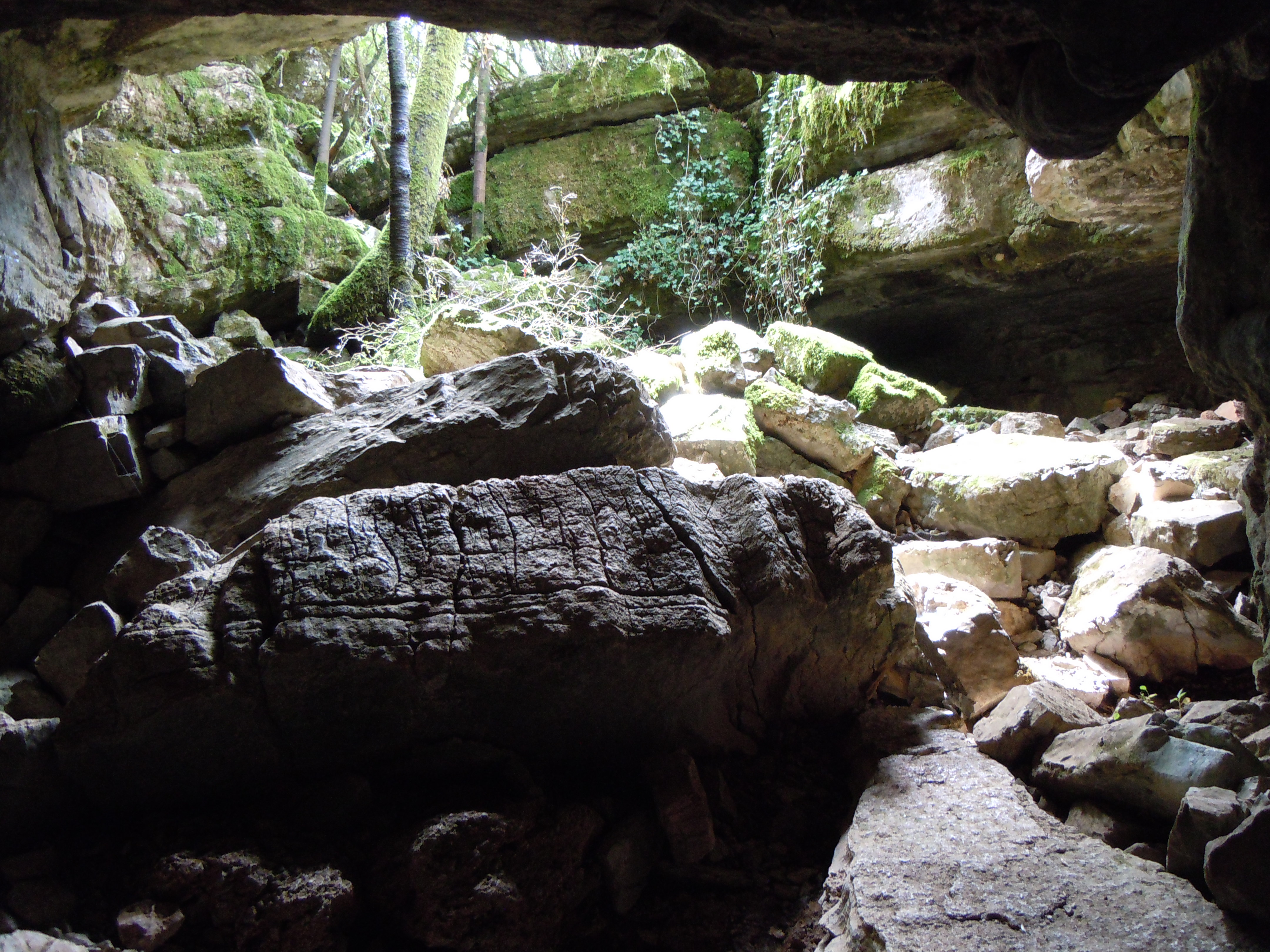 Plateau des Gras - Entrée de le Grotte de Saint-Arnault - Les Assions - Ardèche